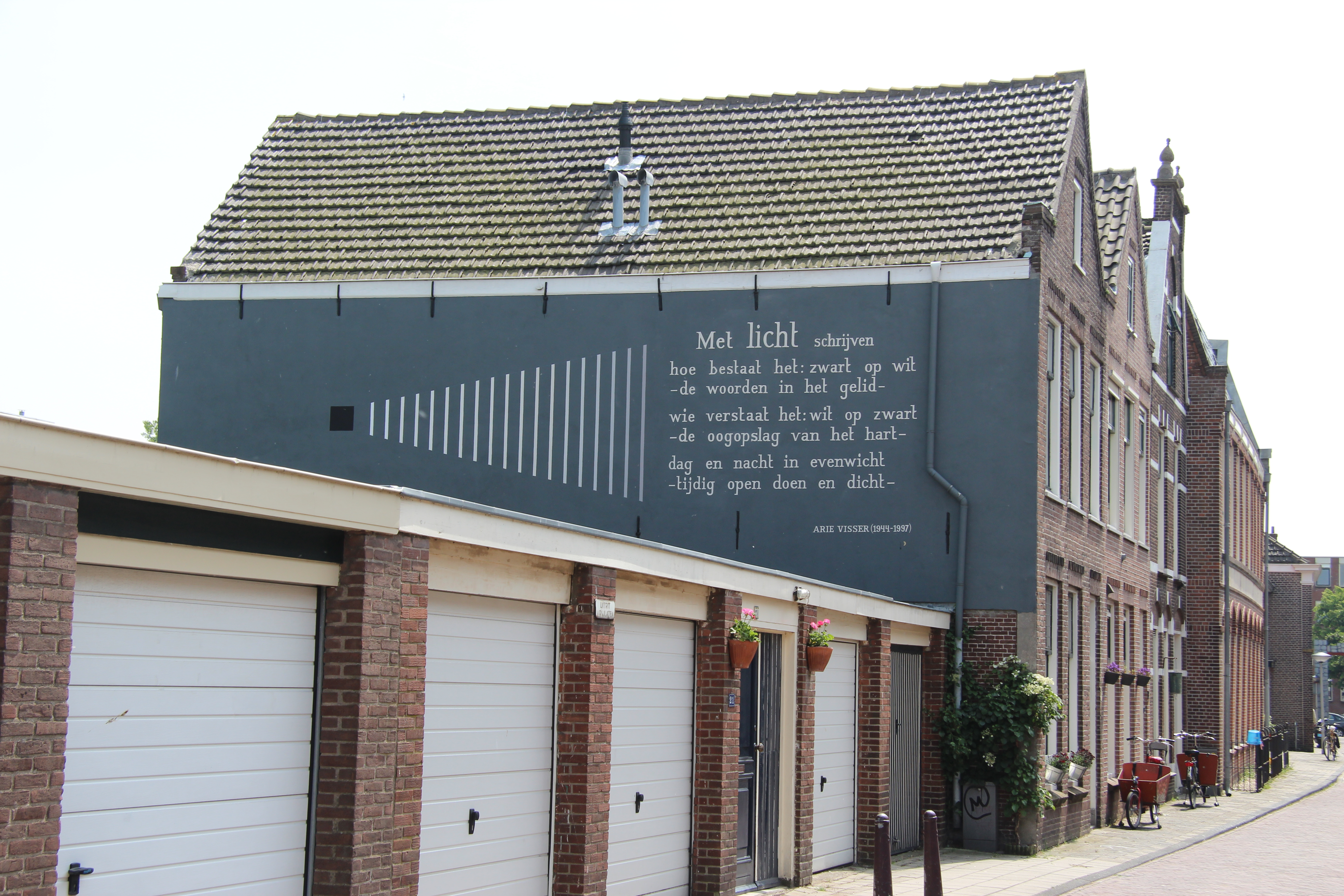 Arie Visser - Met licht schrijven. Officiële onthulling woensdag 12 juni 2013, 19.30 uur, ter gelegenheid van het vierde eeuwfeest van de Maredijkbuurt van 8 t/m 15 juni 2013. Leiden